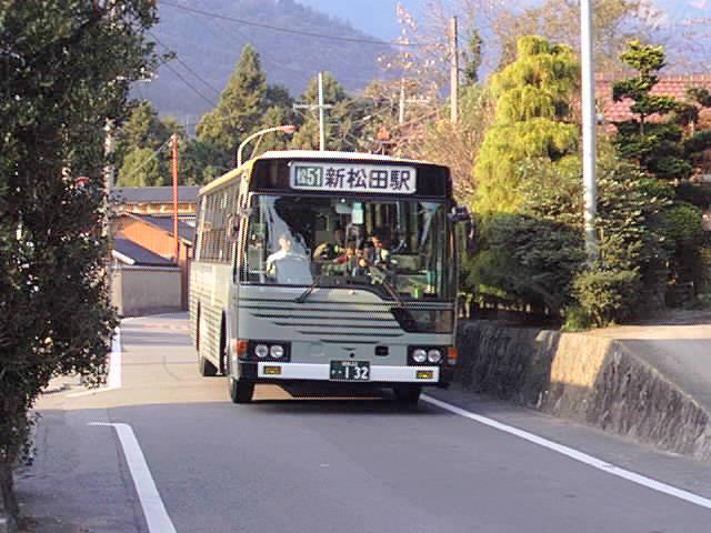 Fujikyu M5562 Mitsubishi KC-MP617M